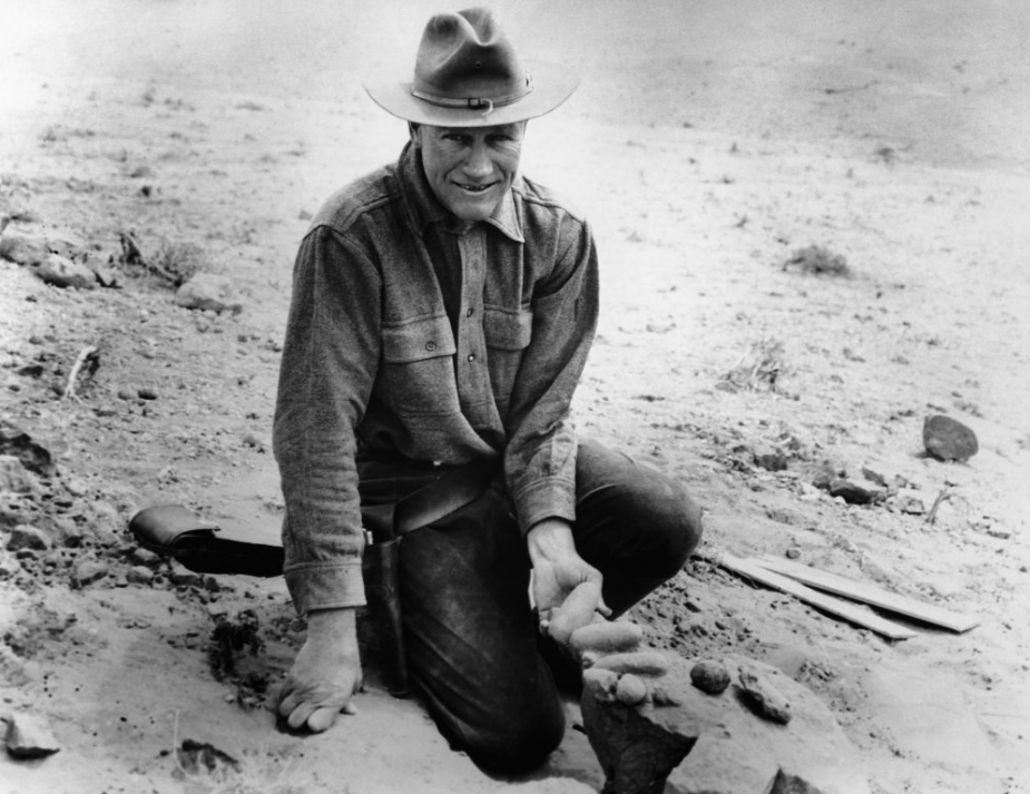 Монгол: Монголд